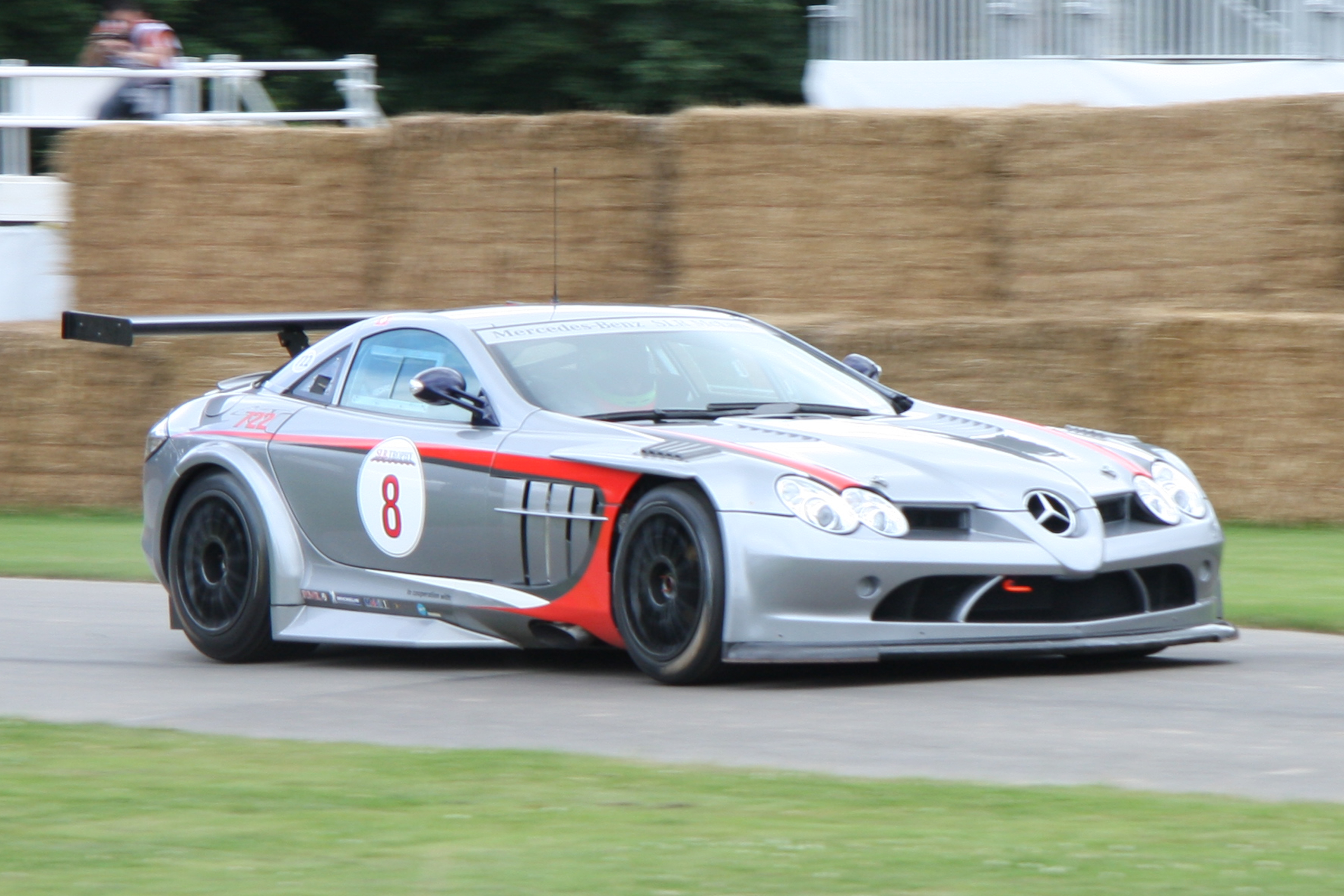 Built 2008. 5.4 litre V8